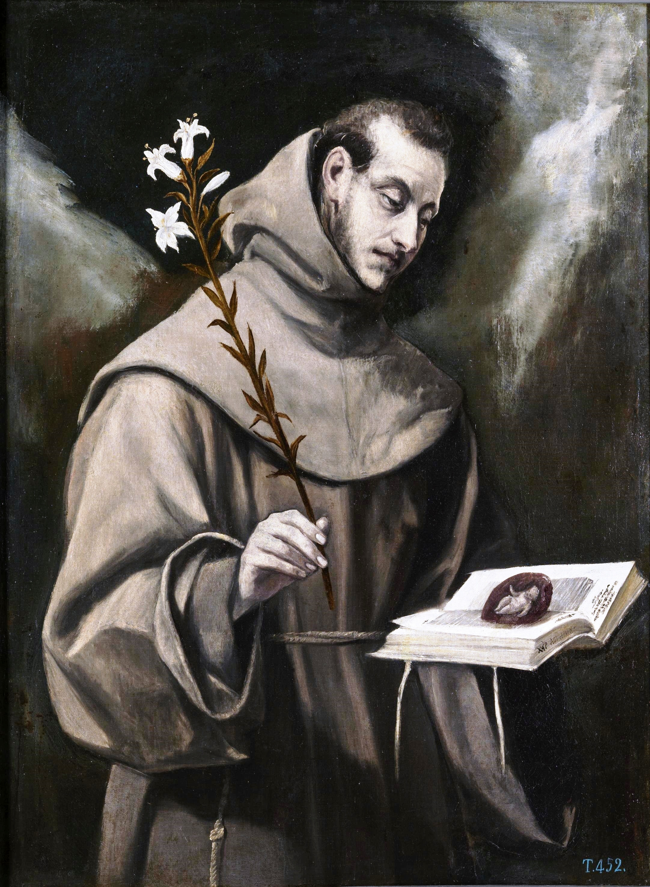 La obra representa a San Antonio de Padua.